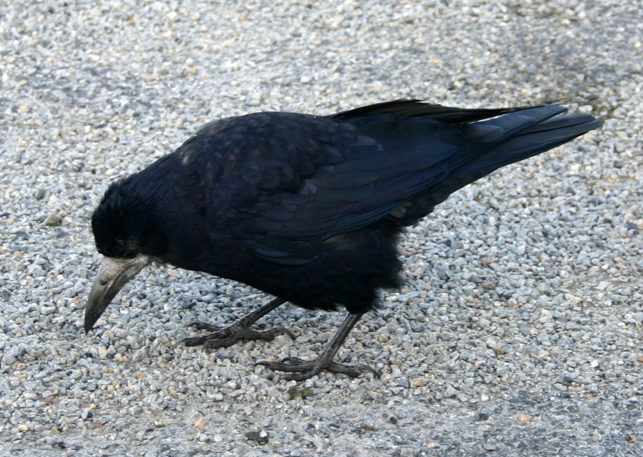 A rook on Dartmoor